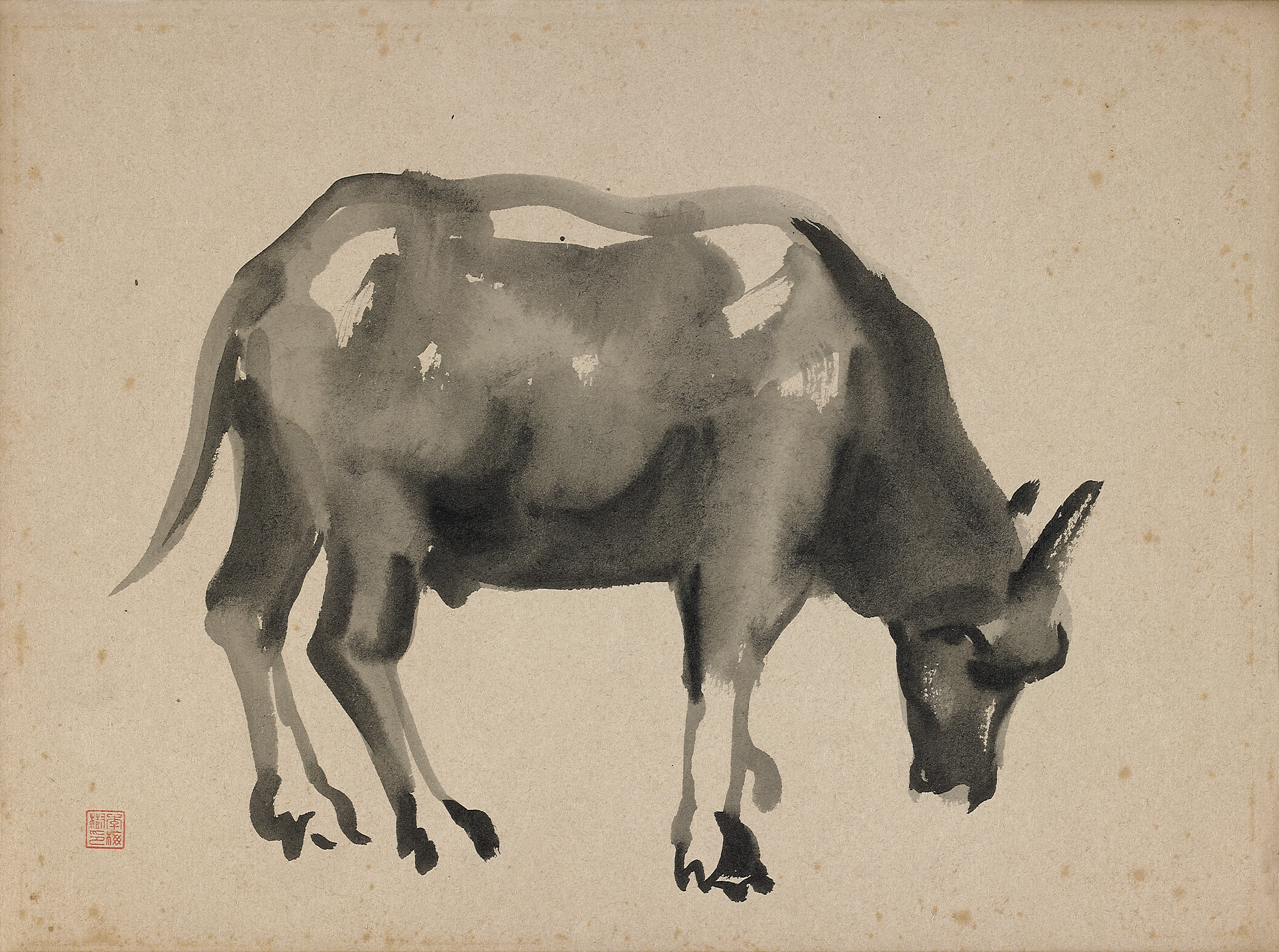 水牛，是一幅水墨畫。